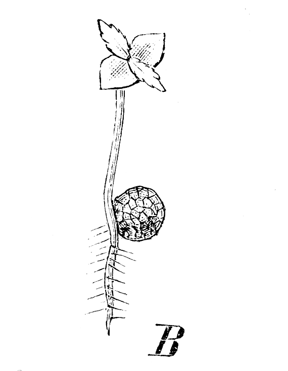 Selaginella denticulata, Keimpflanze mit der Megaspore/"Seedling" with megaspore